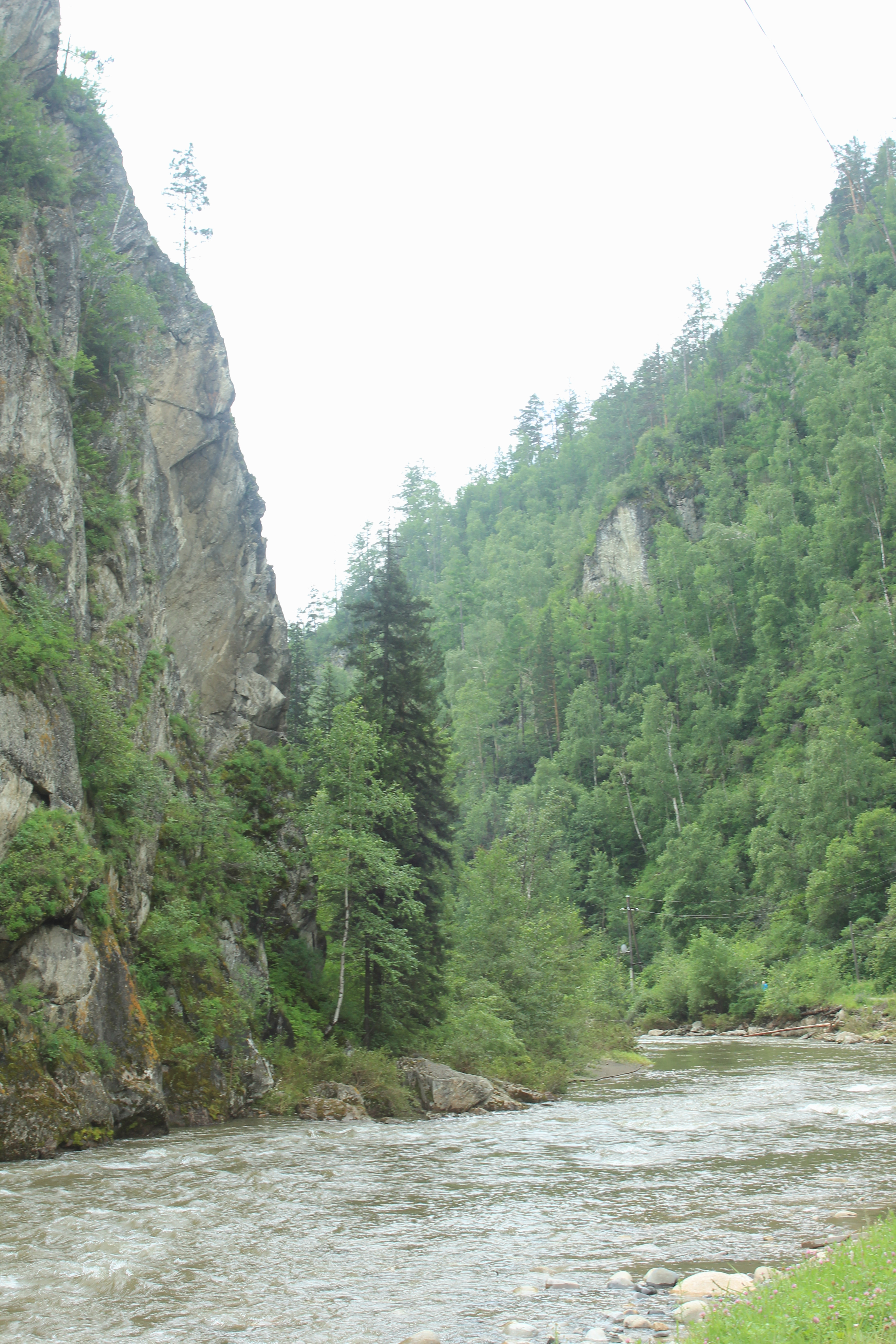 Река Ихе-Ухгунь: Тункинский район, Бурятия This image is related to the protected area of Russia number 0310123